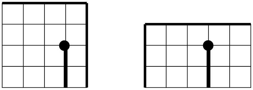 Позиции, в которых игрок может получит штрафной удар. Из издания "Мациевский С. В. Математическая культура. Игры: Учебное пособие. — Калининград: Изд-во Калининградского государственного университета, 2003. — 120 с., ил. — ISBN 5-88874-451-4. — Глава 4. Игры и головоломки. § 2. Футбол."